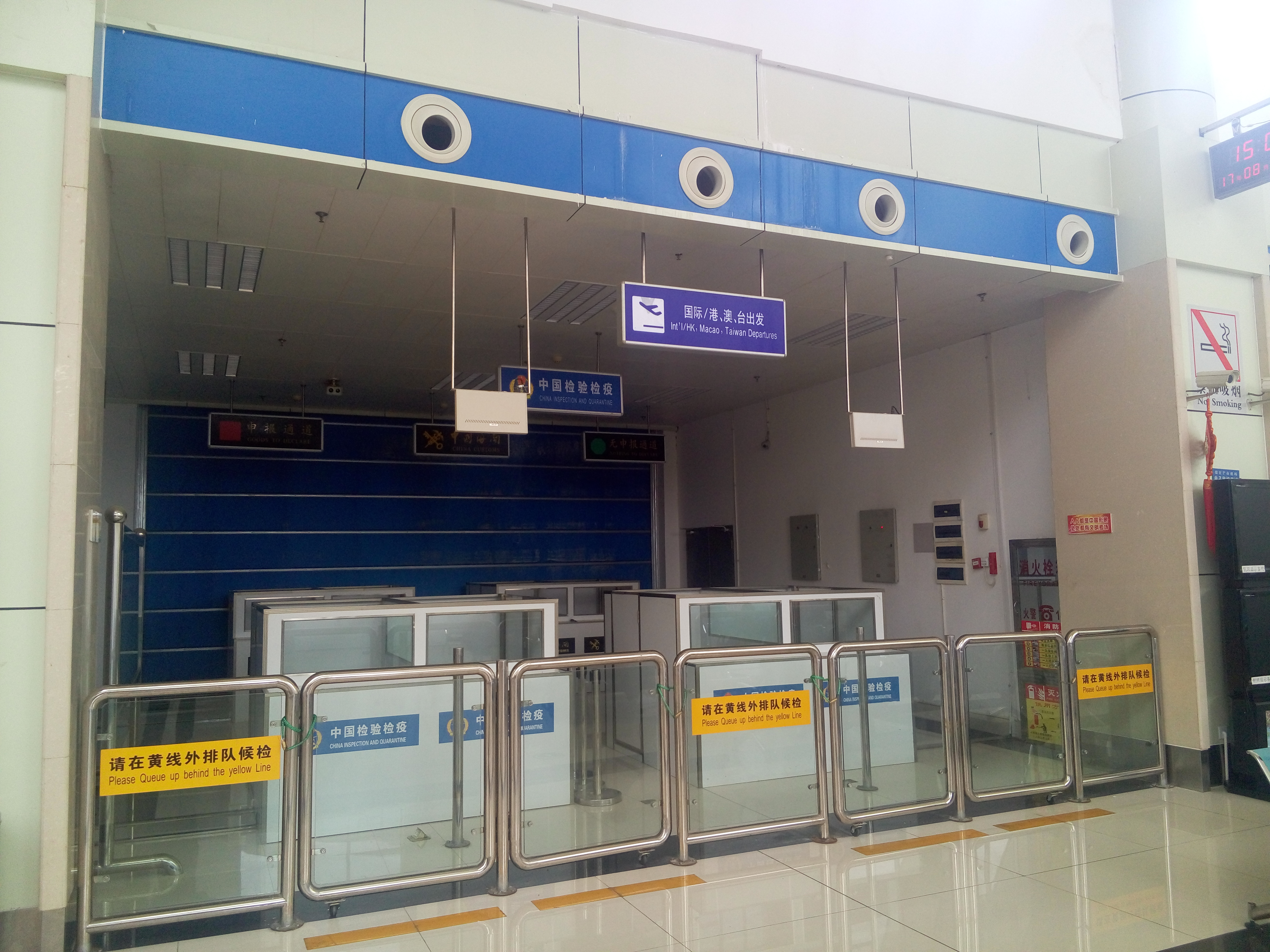 中文（中国大陆）: 德宏芒市机场国际/港澳台出发、海关及检验检疫